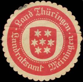 Sealing stamp Title: Landratsamt Meiningen Land Thüringen Description: rot, weiß, geprägt Place: Meiningen size: 5 cm